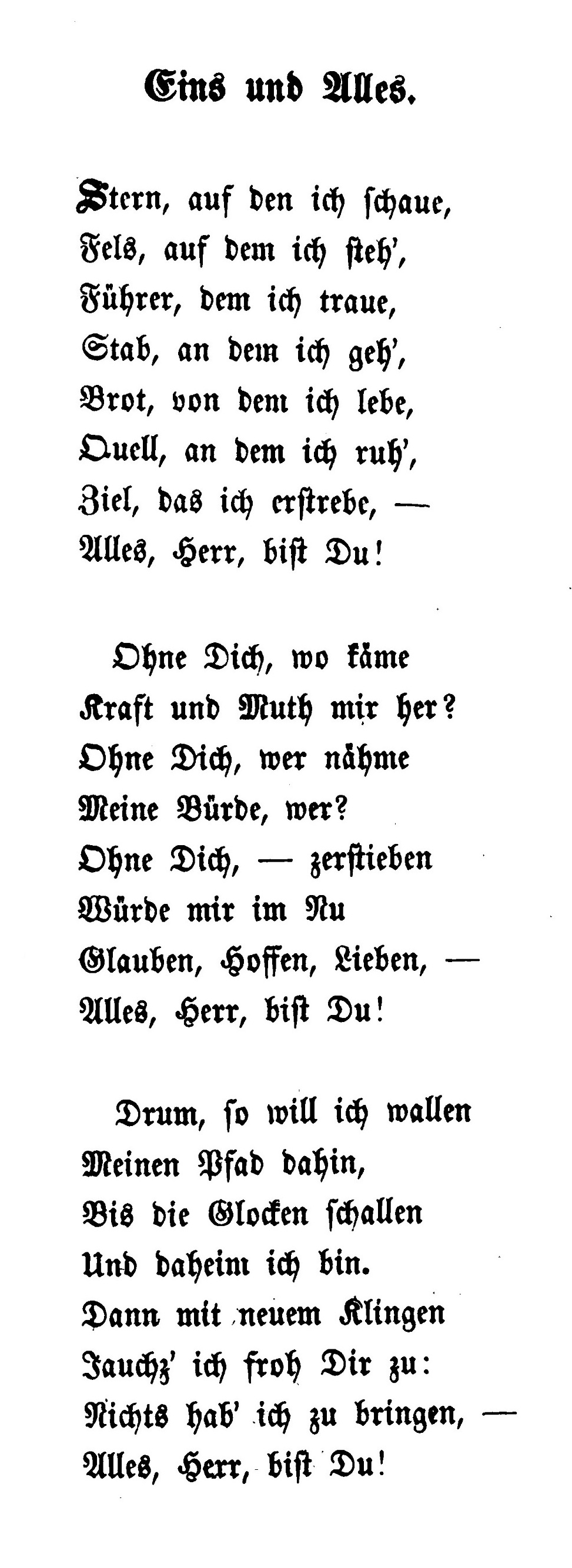 Stern, auf den ich schaue, Erstdruck 1857